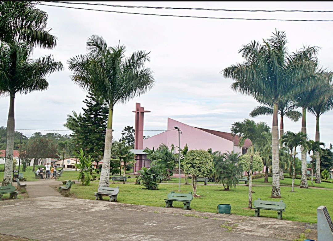 Parque de Río Cuarto